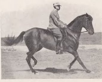 L'écuyer français du Cadre noir Etienne Beudant et son cheval Anglo-barbe Robertsart II au trot en arrière soutenu